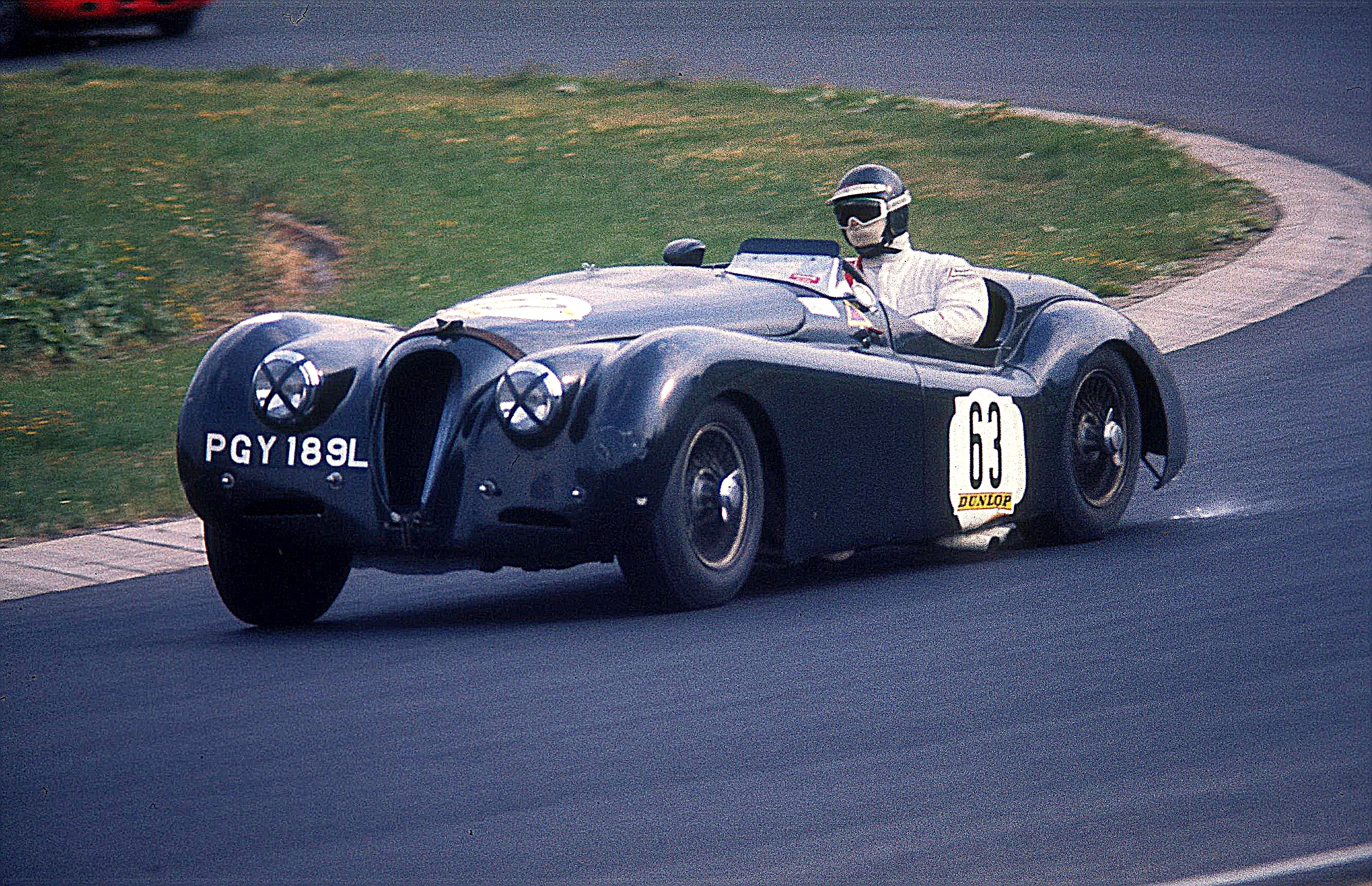 Jaguar XK120, Baujahr 1949